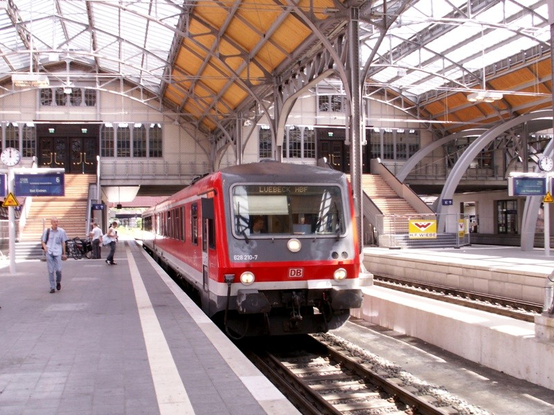 LübeckHbf